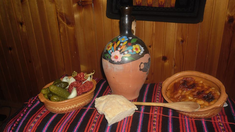 Фотографија од скромна трпеза.